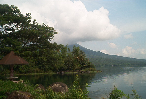 Lake Buhi